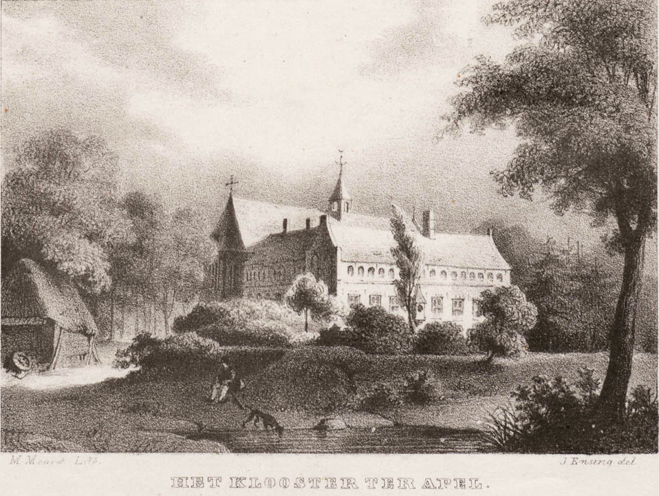 Het klooster van Ter Apel door Jan Ensing